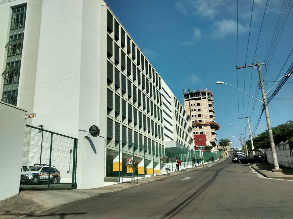 Fórum na cidade de São João del Rei - Minas Gerais - Brasil